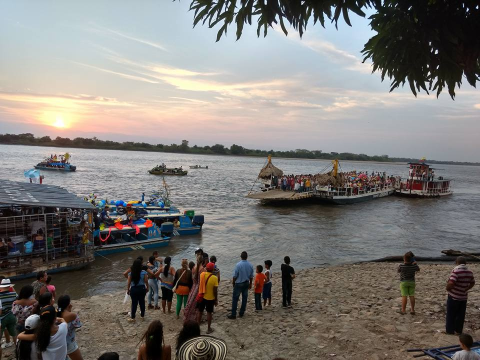 Imagen del puerto de Gamarra (Cesar), en época de carnavales.